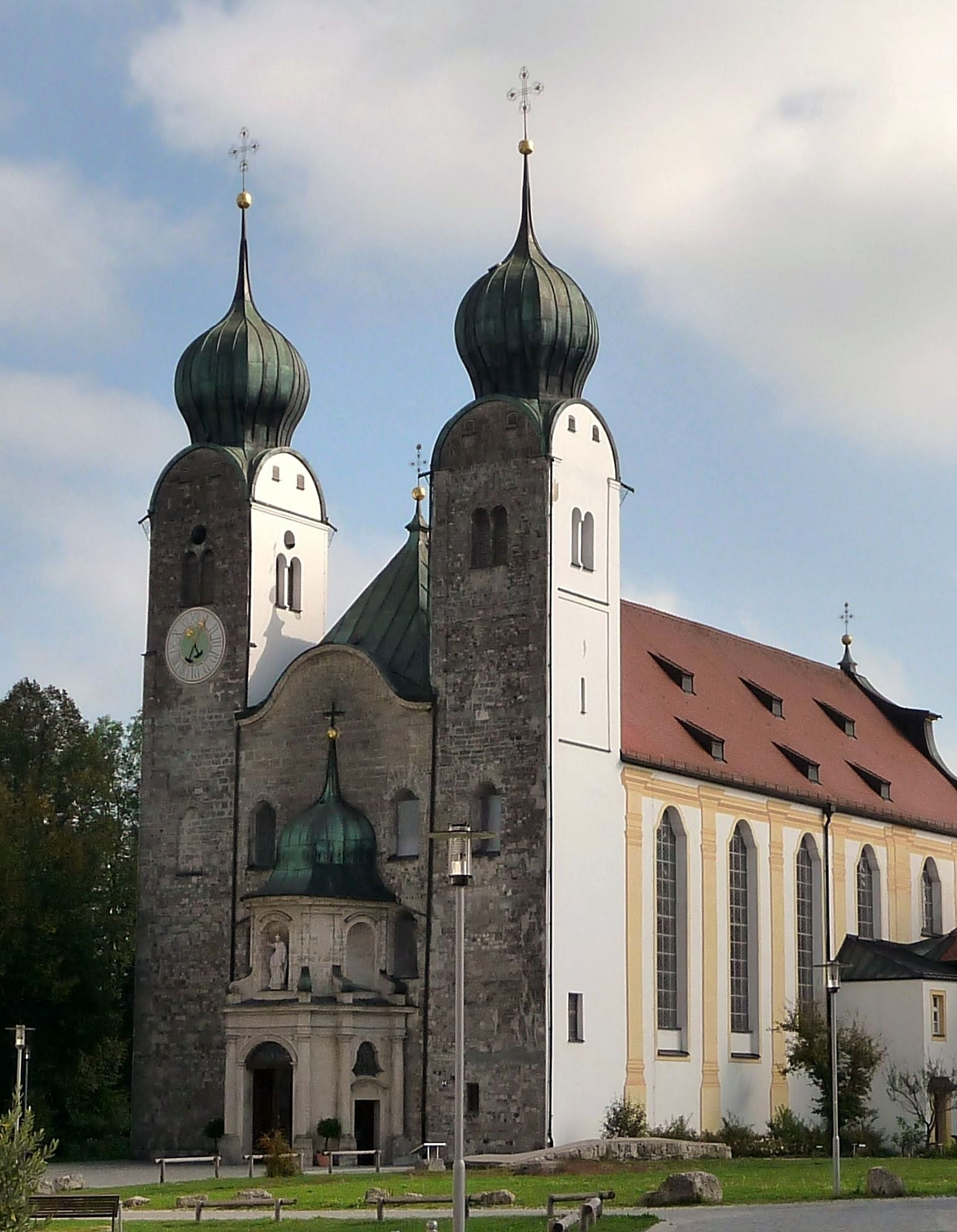 Kloster Baumburg, Klosterkirche St. Margarethen